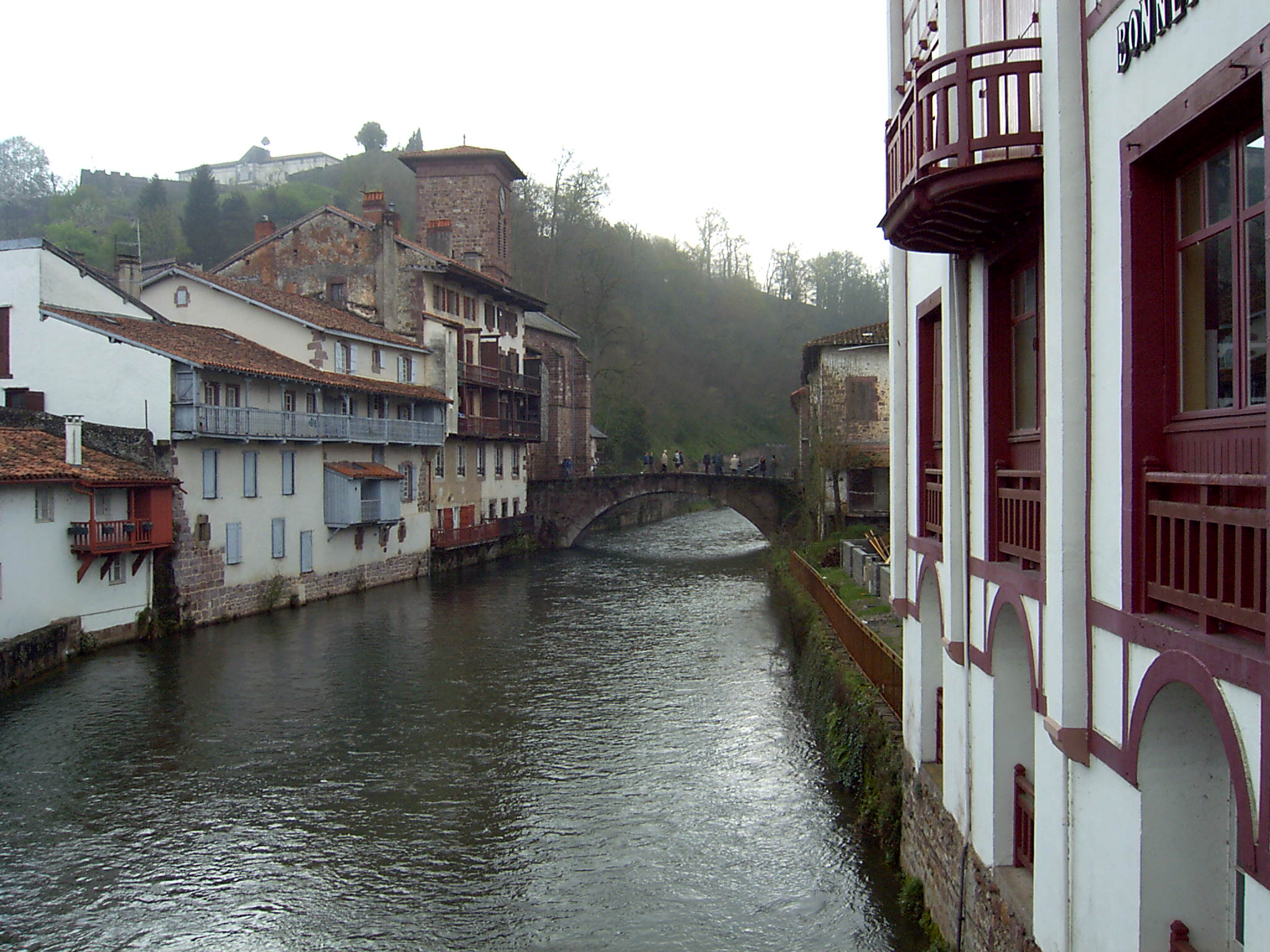 Donibane Garazi